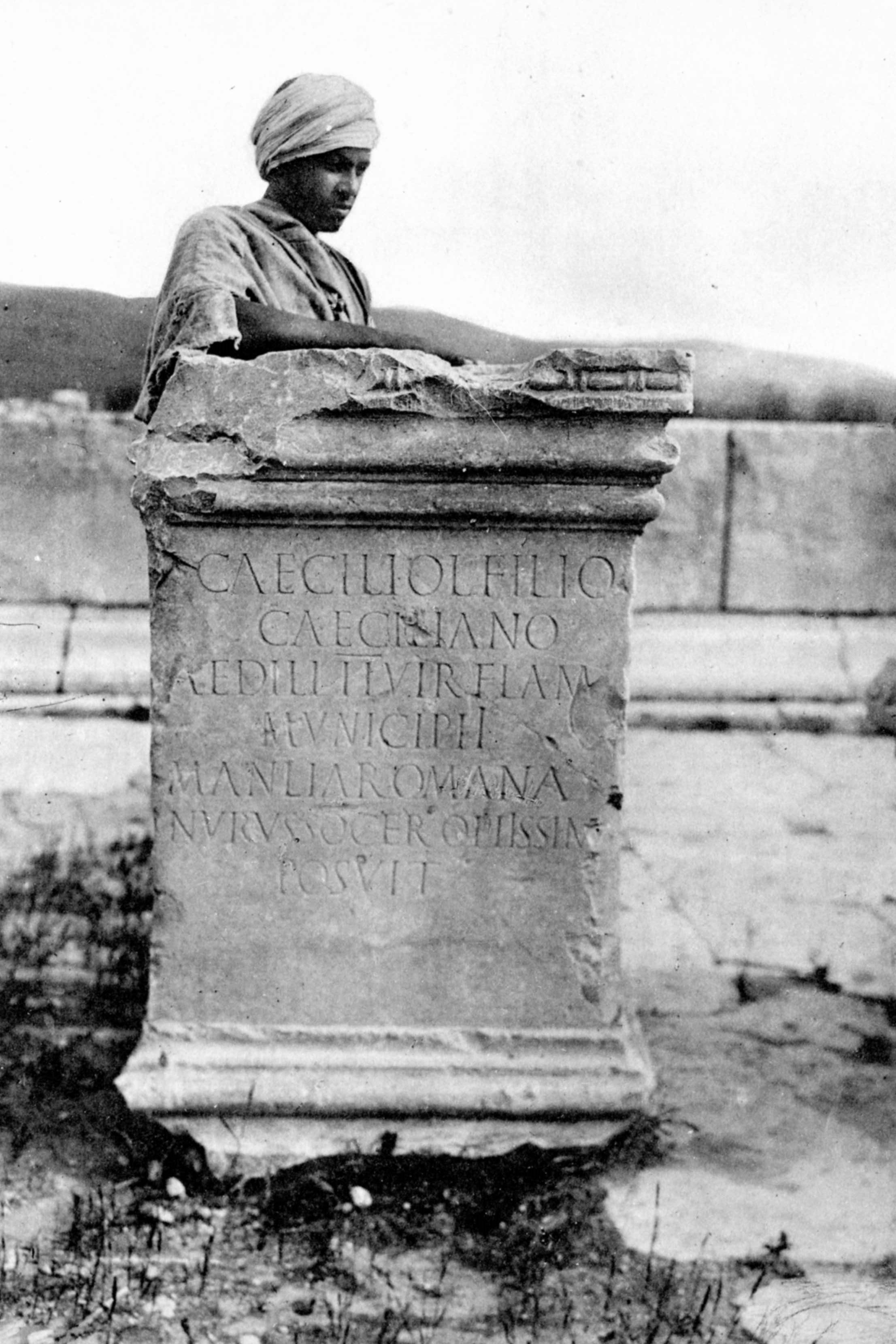 Un socle de statue avec un Marocain à l'arrière-plan. Ce type de représentation est symptomatique de l'idéologie coloniale en vigueur alors